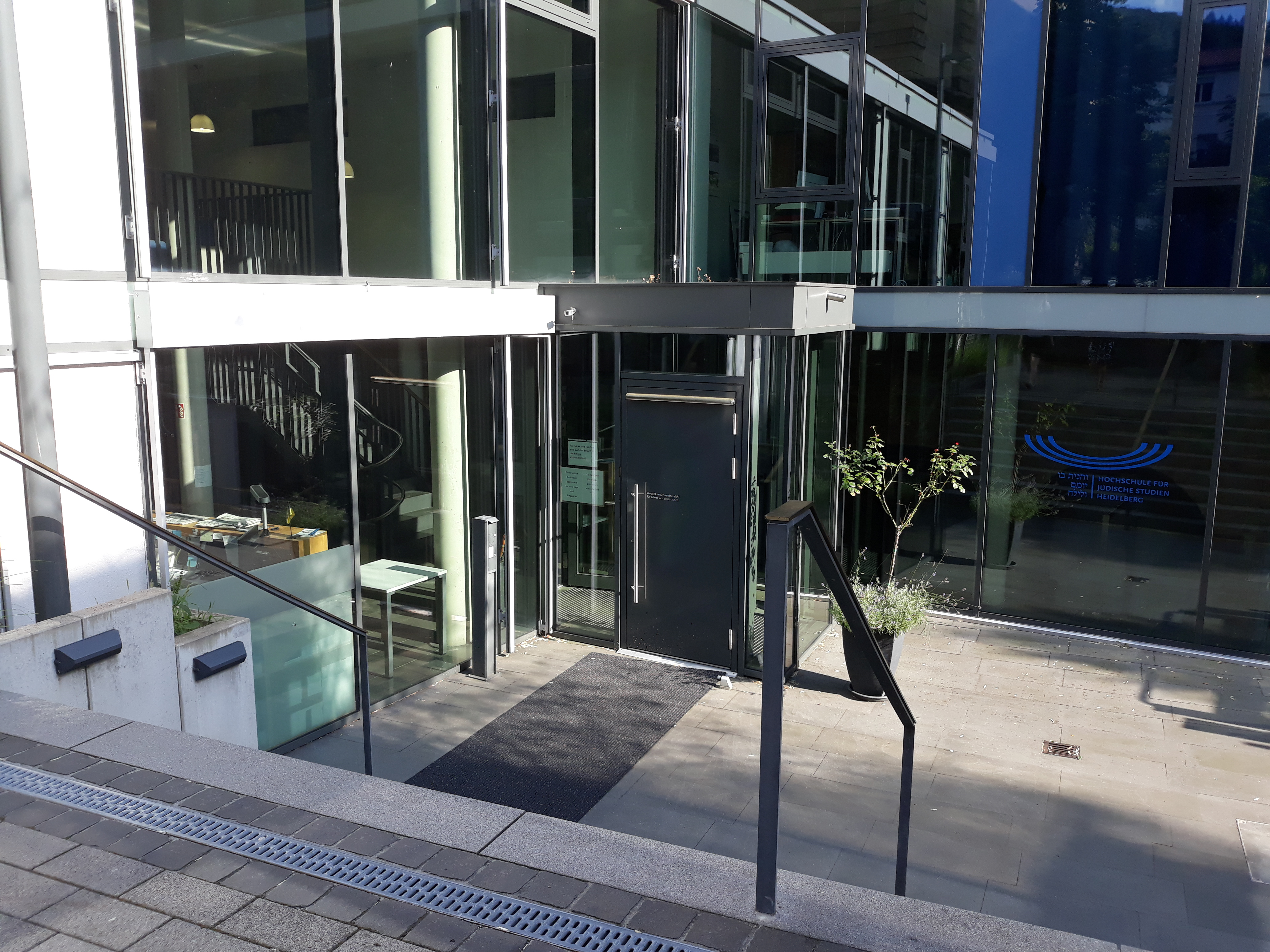 Der neue Haupteingang der Hochschule für jüdische Studien Heidelberg im Neubau.